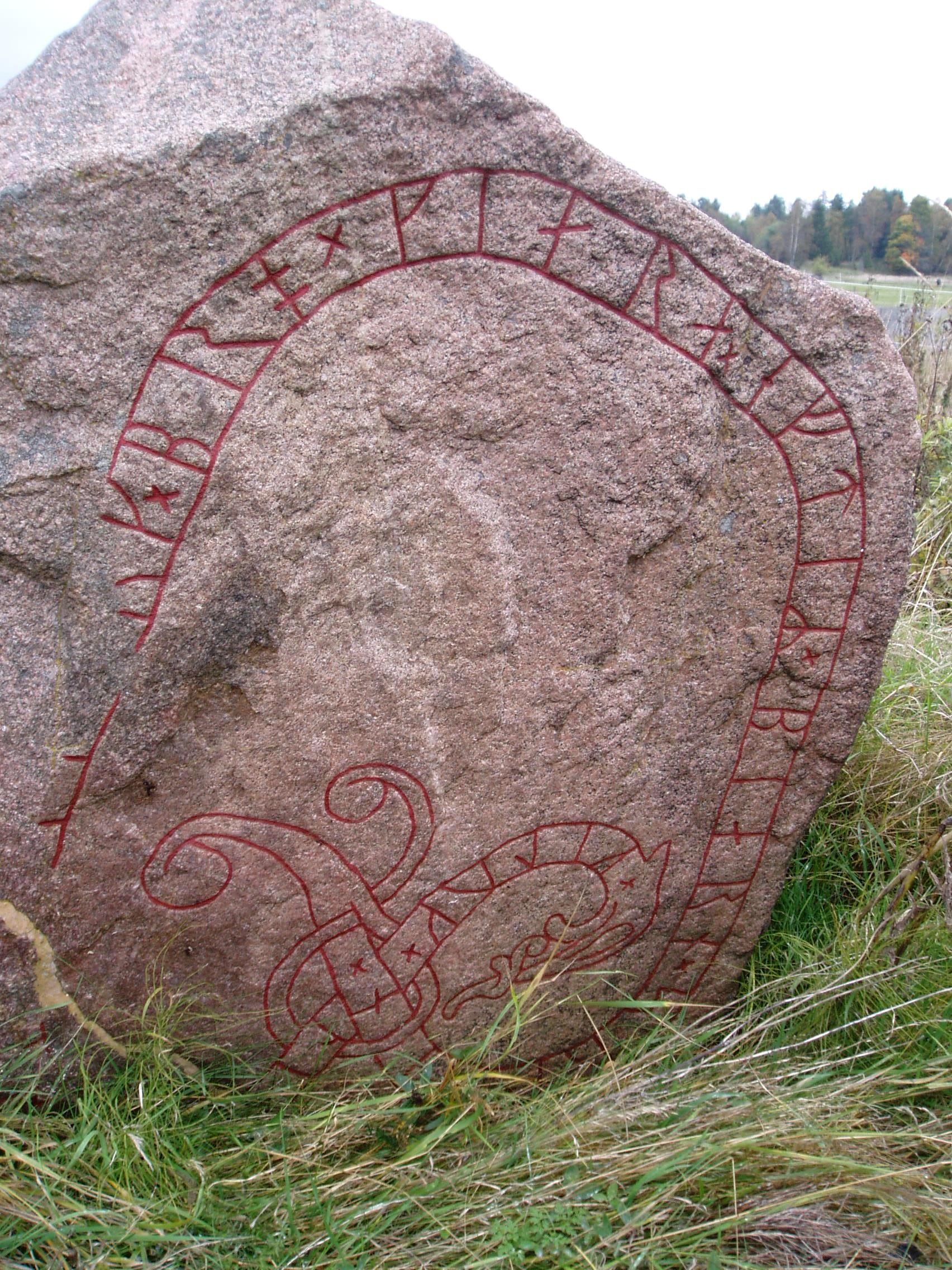 Upplands runinskrifter 267